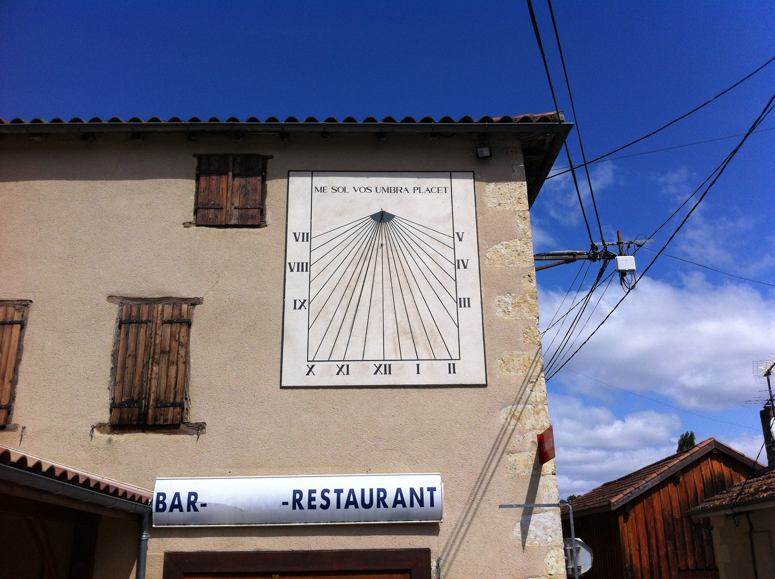 Cadran solaire à Auterrive près d'Auch (Gers, France)